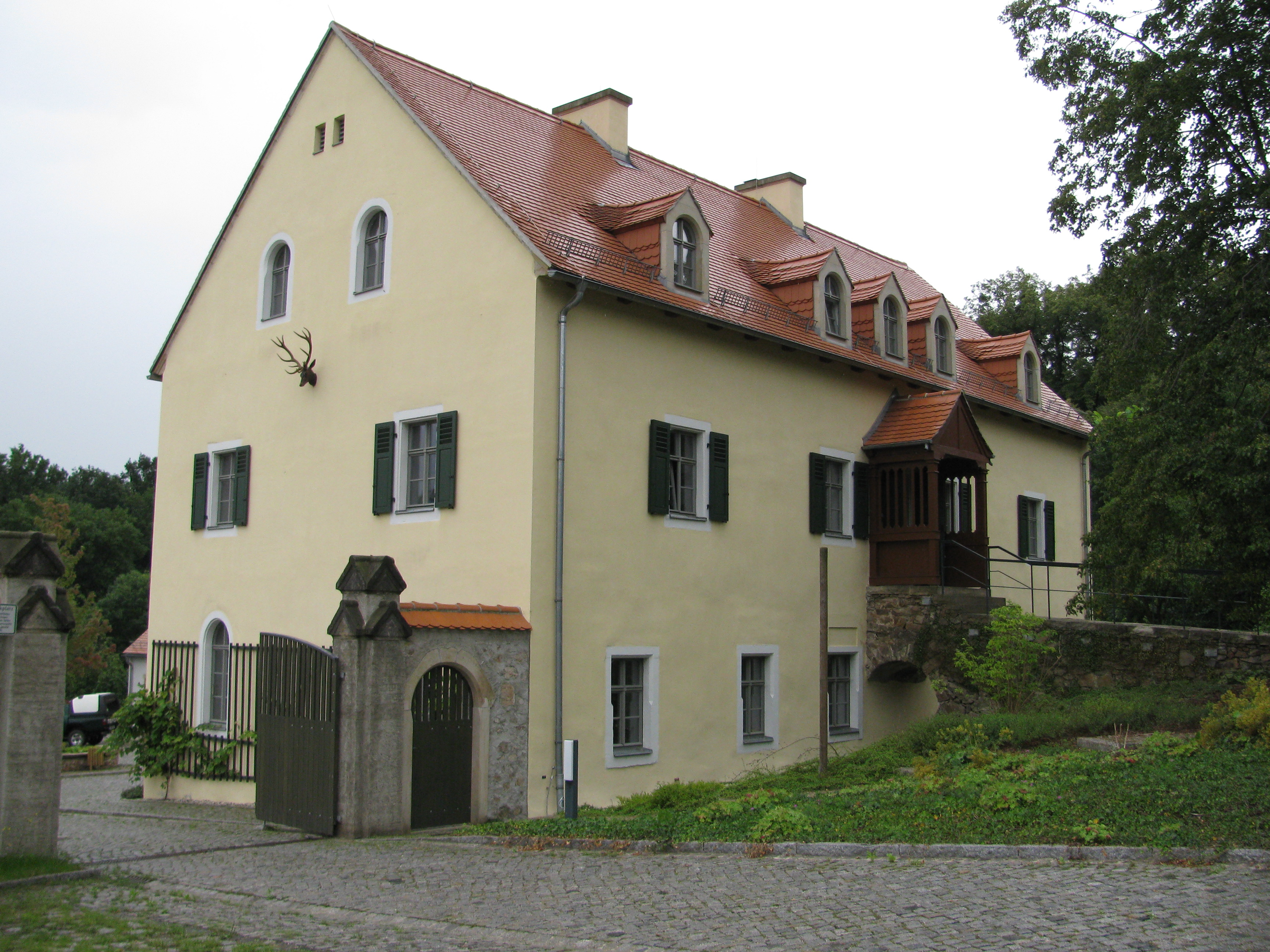 Forsthaus Kreyern, Coswig, Sachsen